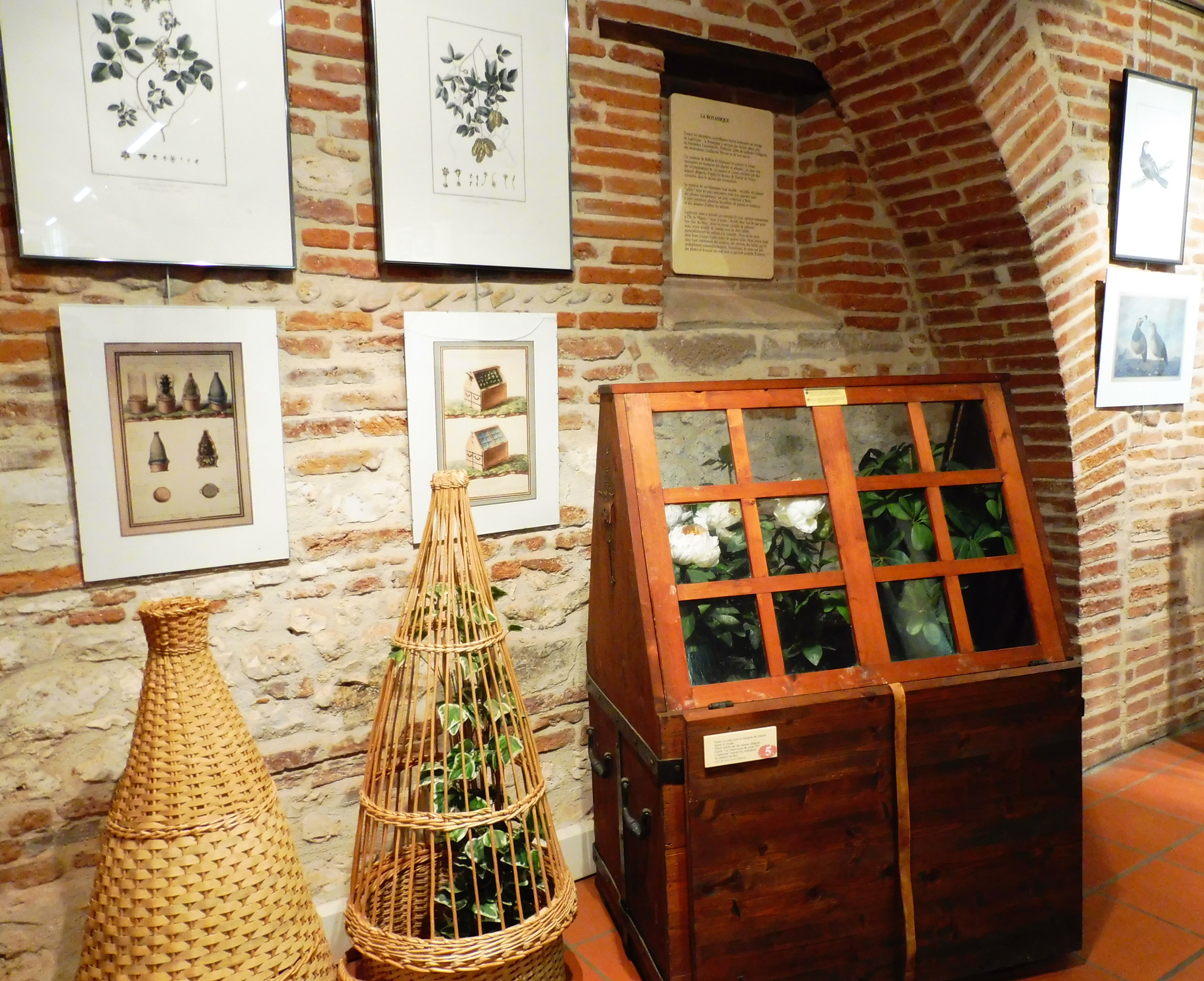 Les botanistes de l'expédition Lapérouse, Musée d'Albi.